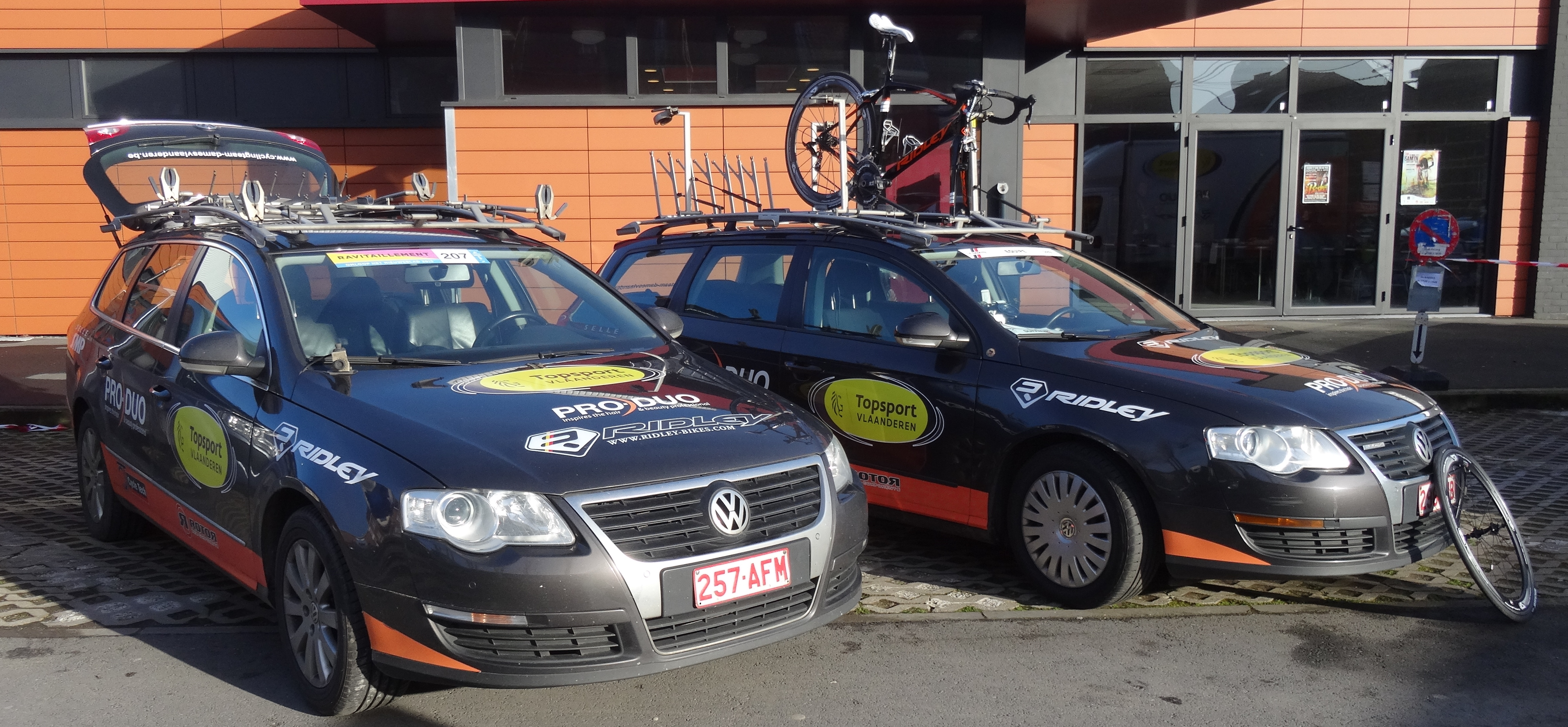 Reportage réalisé le mercredi 4 mars à l'occasion du départ du Samyn des Dames 2015 et du Samyn 2015 à Quaregnon, Belgique.